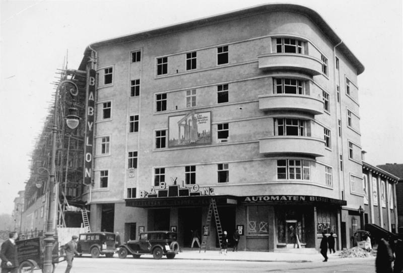 Scherl Bilderdienst: Ein neues Gross-Filmtheater [Babylon] am Bülowplatz wurde in diesen Tagen als Erstaufführungstheater des Zentrums eröffnet. Das Theater steht unter der kundigen Leitung des von der Alhambra am Kurfürstendamm und den Mercedes-Palästen bekannten Theaterfachmannes Arthur Rupp. 12193-29